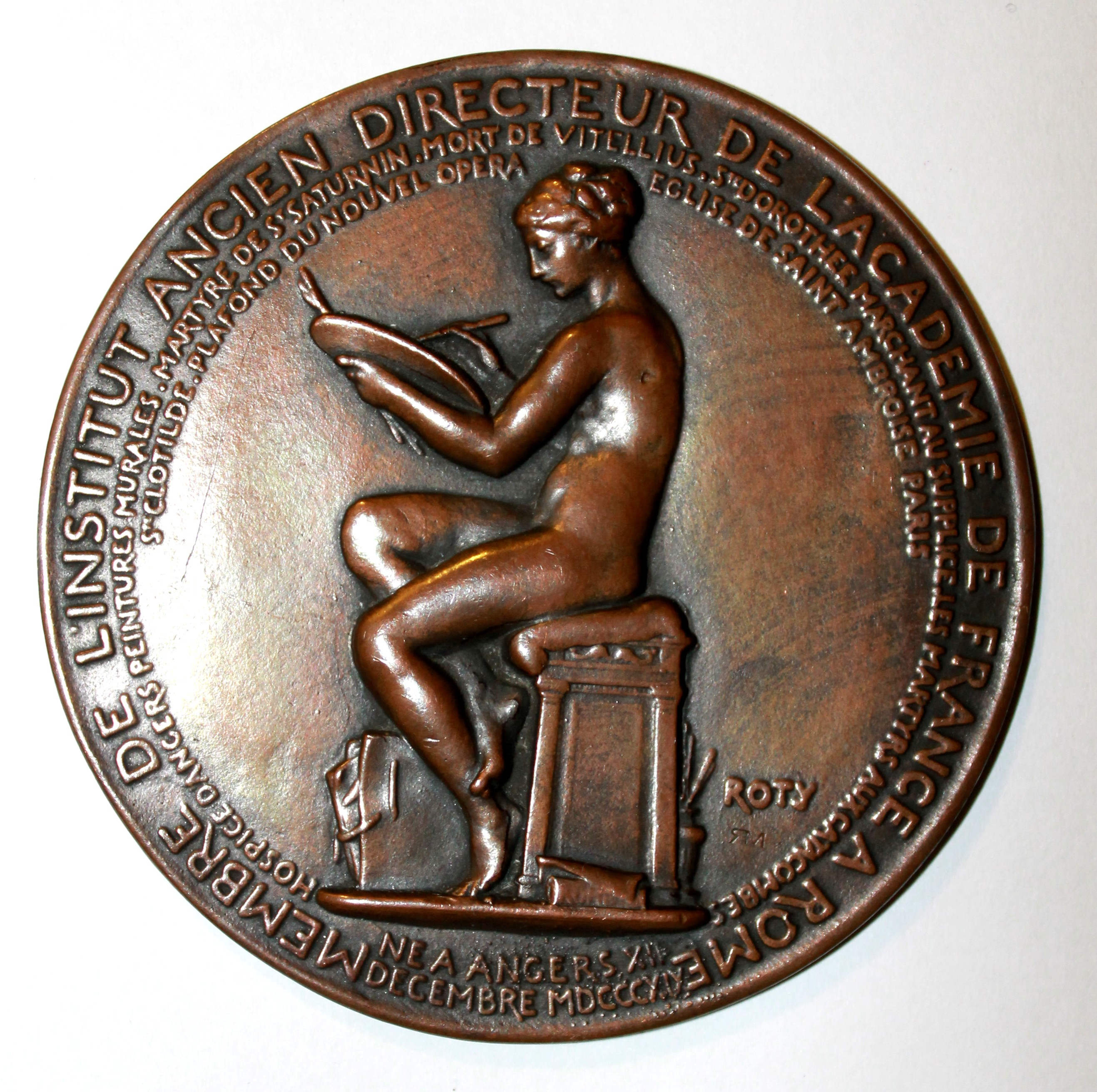 Médaille fondue (revers, 68mm) réalisée par Oscar Roty en 1881 pour le peintre Jules Eugène Lenepveu. Une femme nue personnifiant la Peinture (PITTURA) tient une palette et des pinceaux, à ses pieds un rouleau avec l'inscription: ROME. Né à Angers, XII décembre MDCCCXIX, Membre de l'Institut, ancien directeur de l'Académie de France à Rome. Hospices d'Angers peintures murales, martyre de St Saturnin, mort de Vitellius, Ste Dorothée marchant au supplice, les martyres aux catacombes. Sainte-Clotilde, plafond du nouvel Opéra, Église Saint-Ambroise (Paris). (Médaille issue de la collection de Roger Marx) Voir: Médaille au Musée d'Orsay Dessin au musée du Louvre, département des Arts graphiques